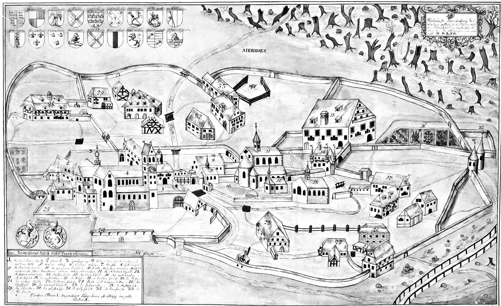 "Wahrhaffte abcontrafeung des würdigen gotteshaus St. Blasien auf dem Schwarzwald im Konstanzer Bistum an der Alb gelegen im Jahreszahl MDLXII". Aufbewahrungsort: Sankt Paul / Stiftsarchiv